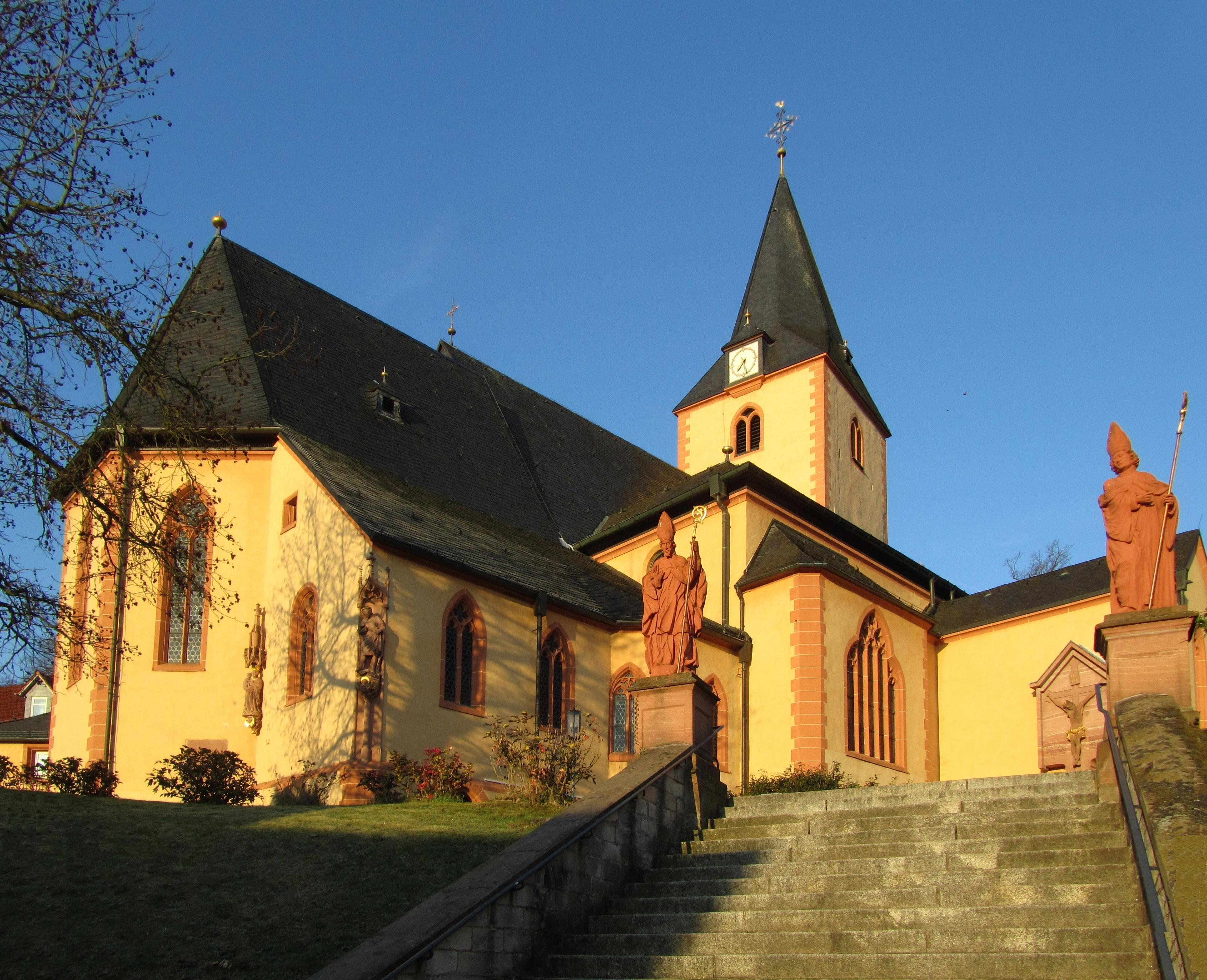 St. Martin in Bad Orb